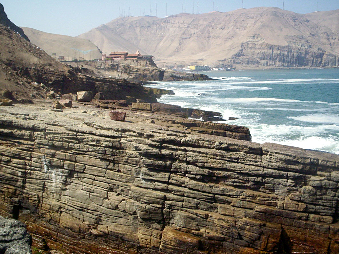 Formación Salto del Fraile en la costa de Peru cerca de Lima.